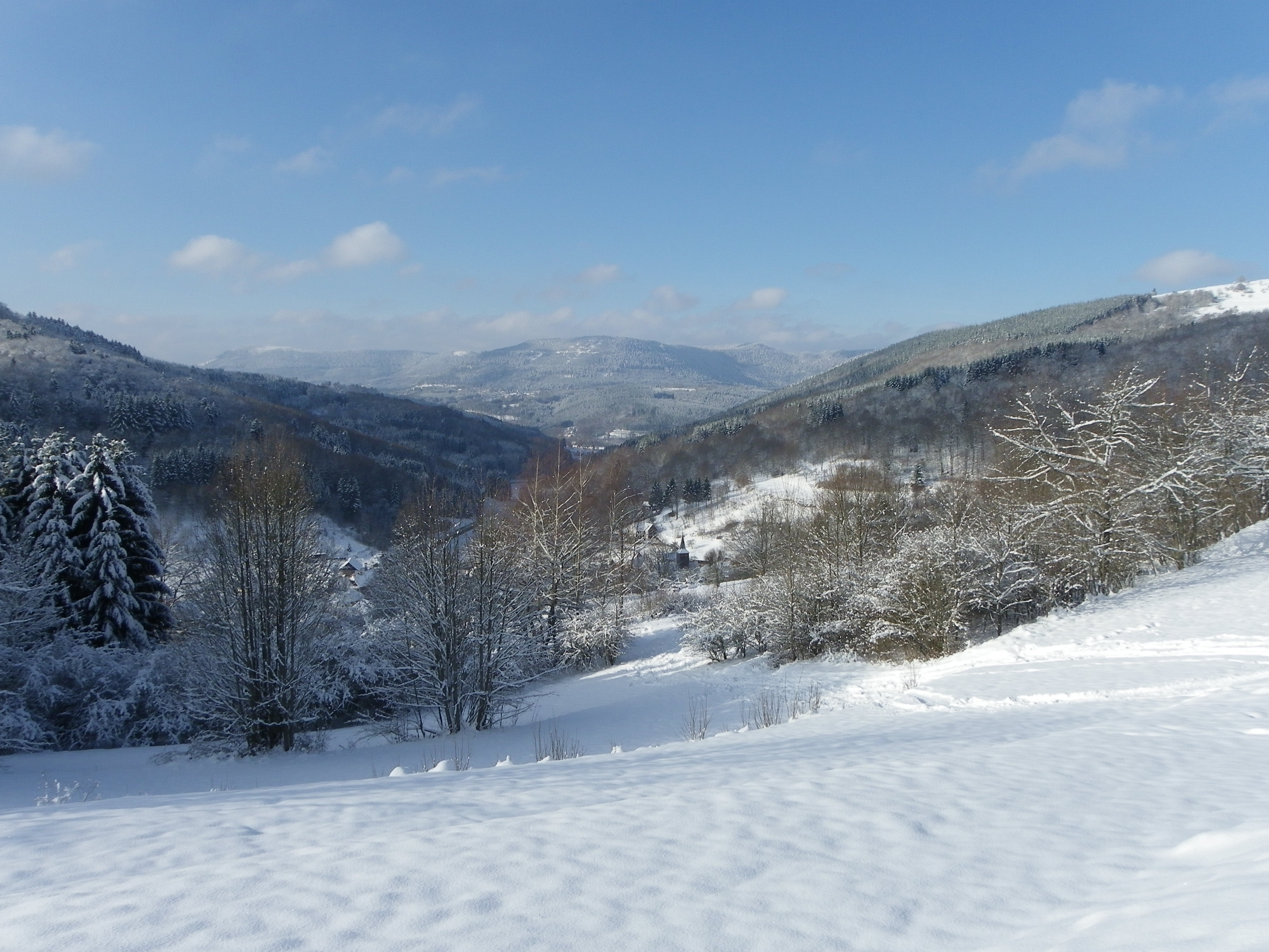 Pris juste au dessus de Waldersbach (Fouday est en face)